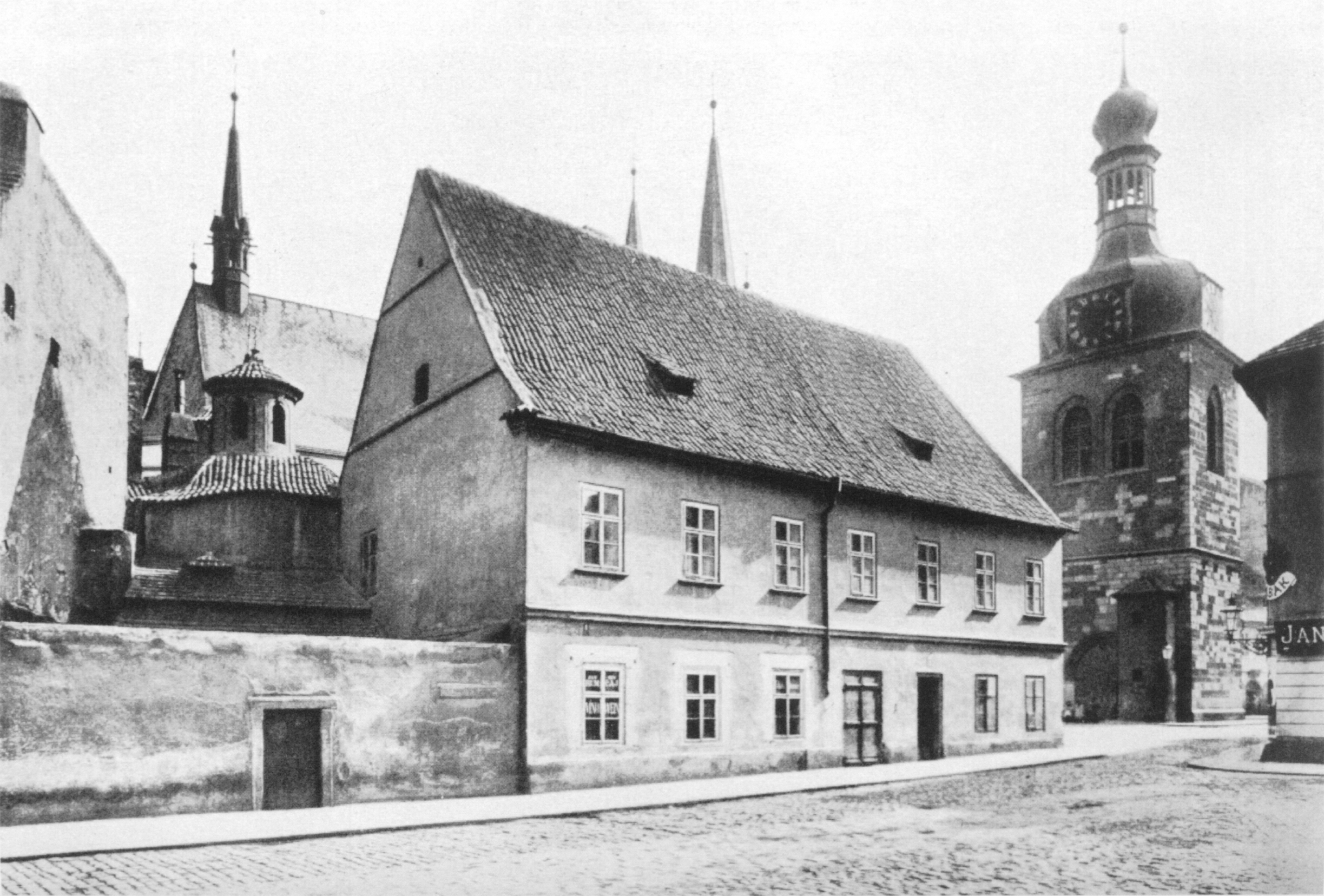 Škola a kostnice před kostelem svatého Petra na Poříčí v Praze. Obě byly zbořeny v roce 1894.